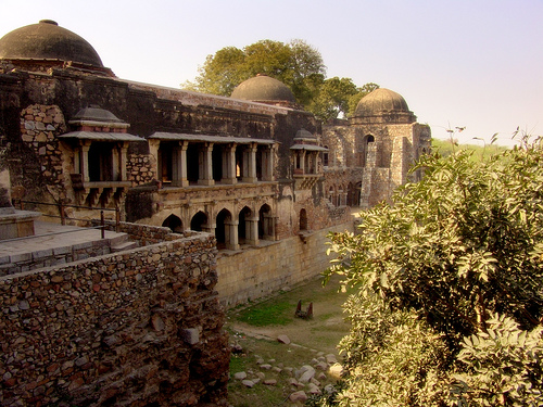 vestiges des anciennes villes de Delhi